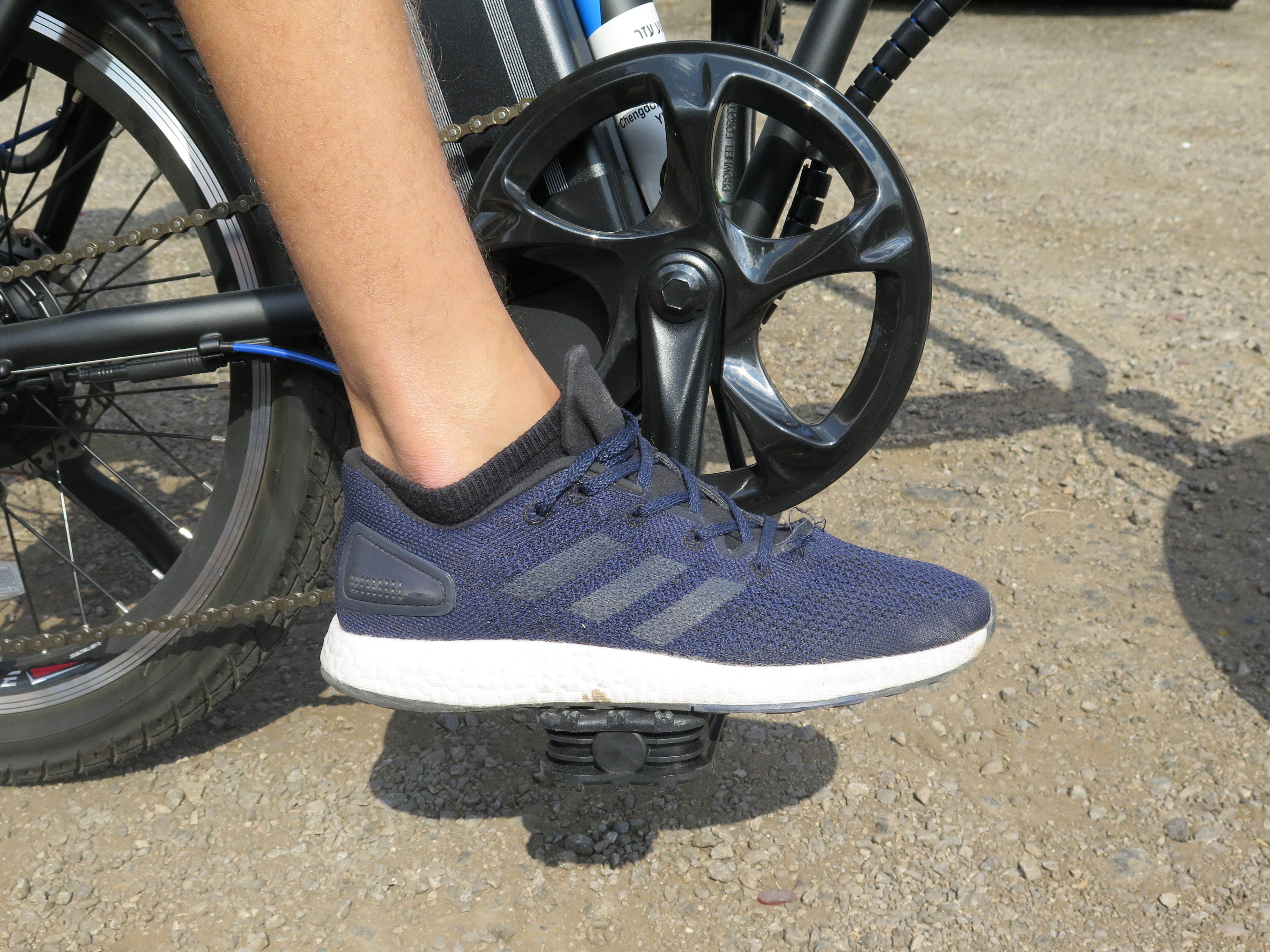 פדל אופניים